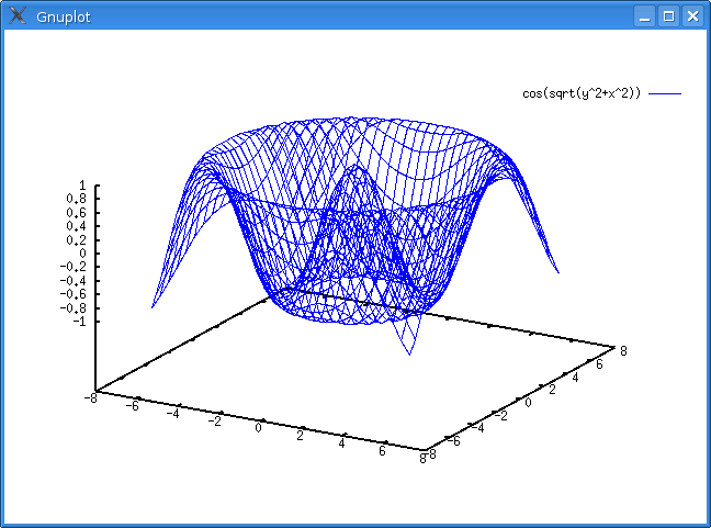 Gnuplot x11 sous Linux Debian